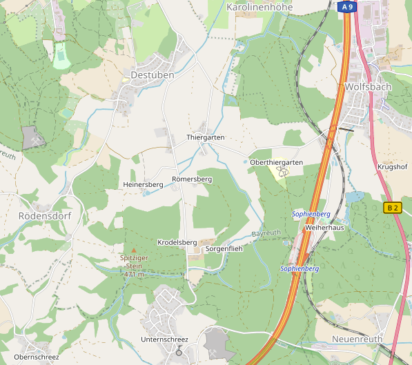 Karte von Bayreuth-ThiergartenThis map of Bayreuth-Thiergarten was created from OpenStreetMap project data, collected by the community. This map may be incomplete, and may contain errors. Don't rely solely on it for navigation.